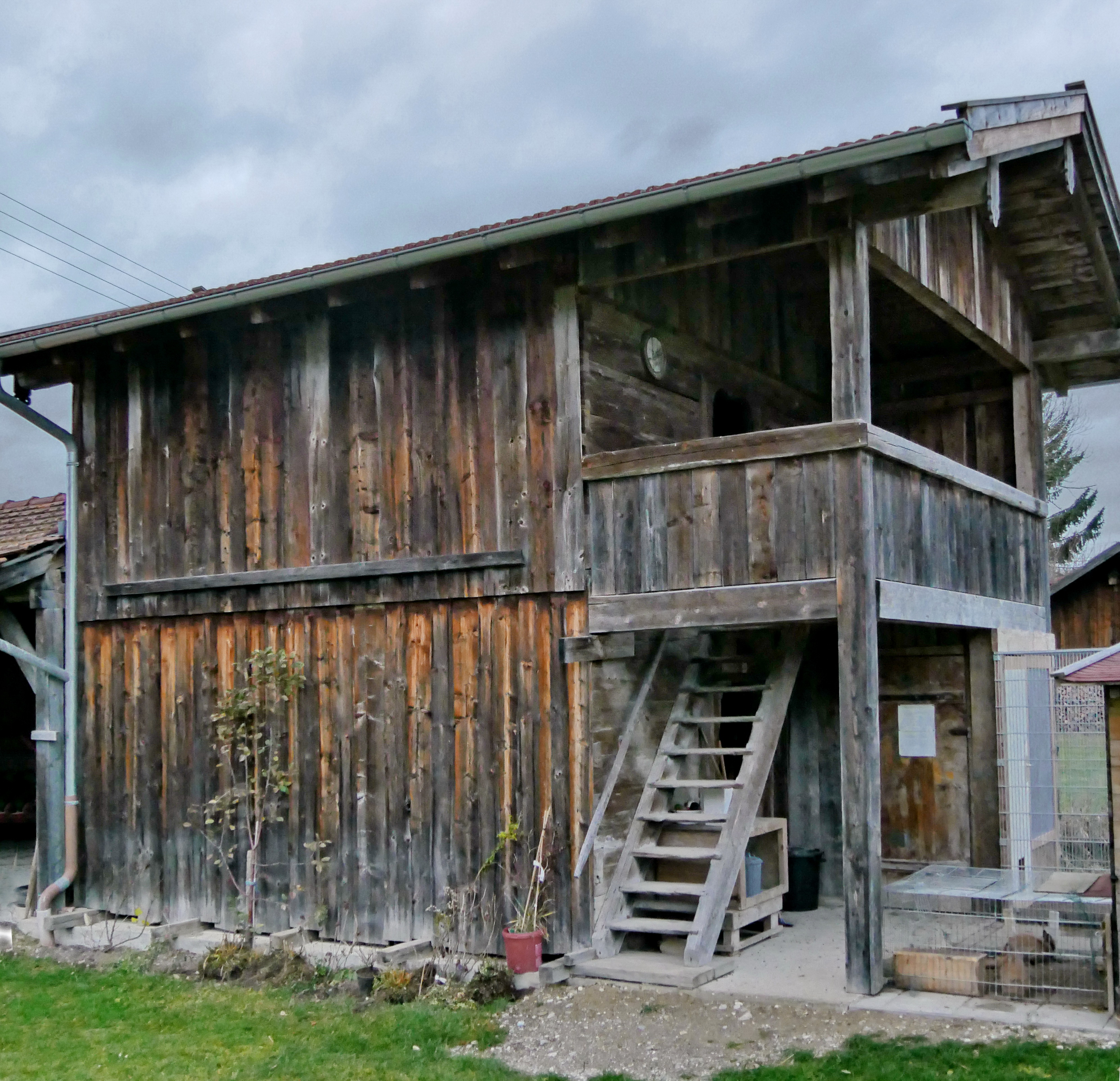 Steingaden, Ortsteil Steingädele, Steingädele 15:Getreidekasten Gesamtansicht